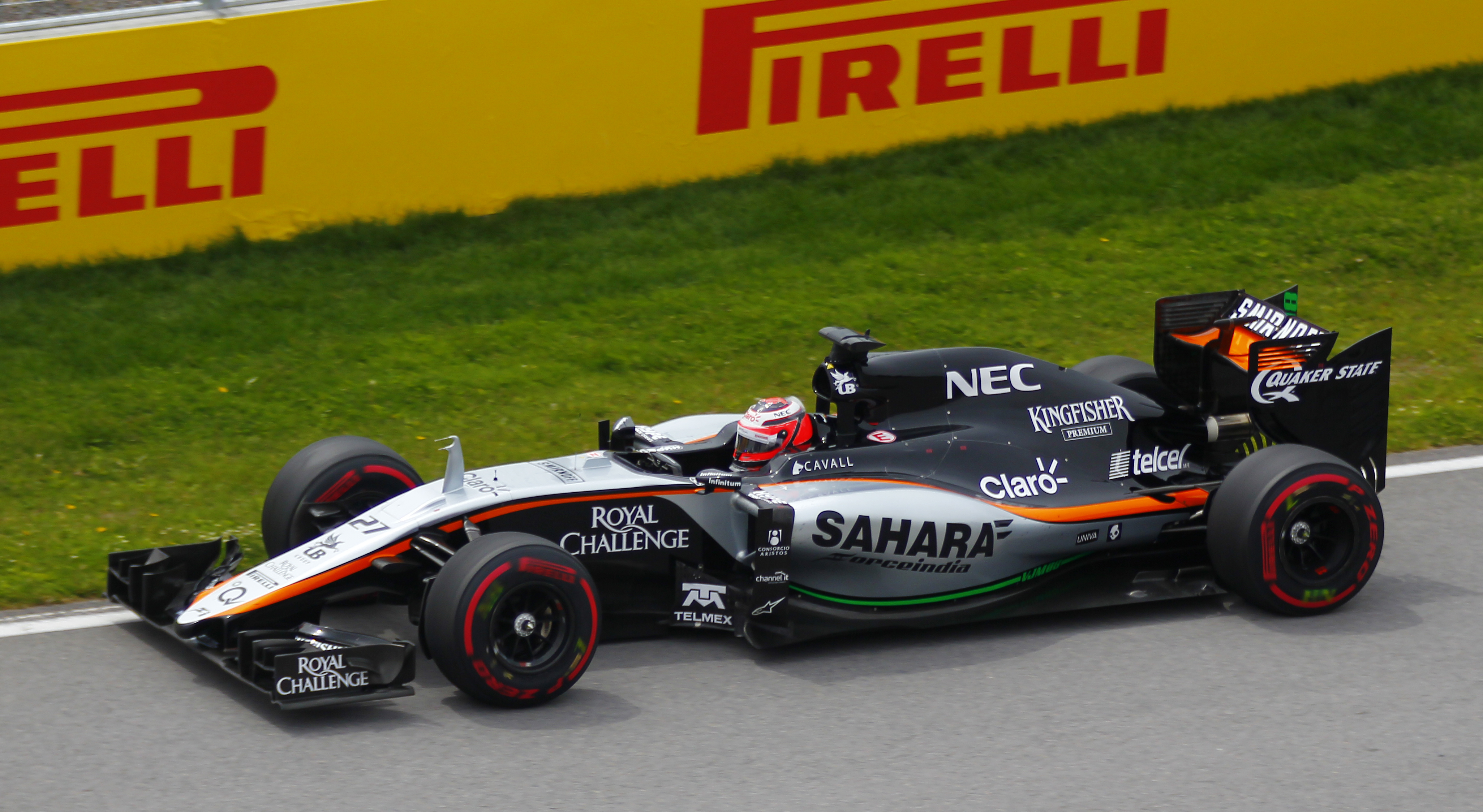 Nico Hulkenberg - Sahara Force India Formula One Team - Grand Prix du Canada - Circuit Gilles-Villeneuve - 7 juin 2015 (Photo Paul-Émile Poulin-Jacques)